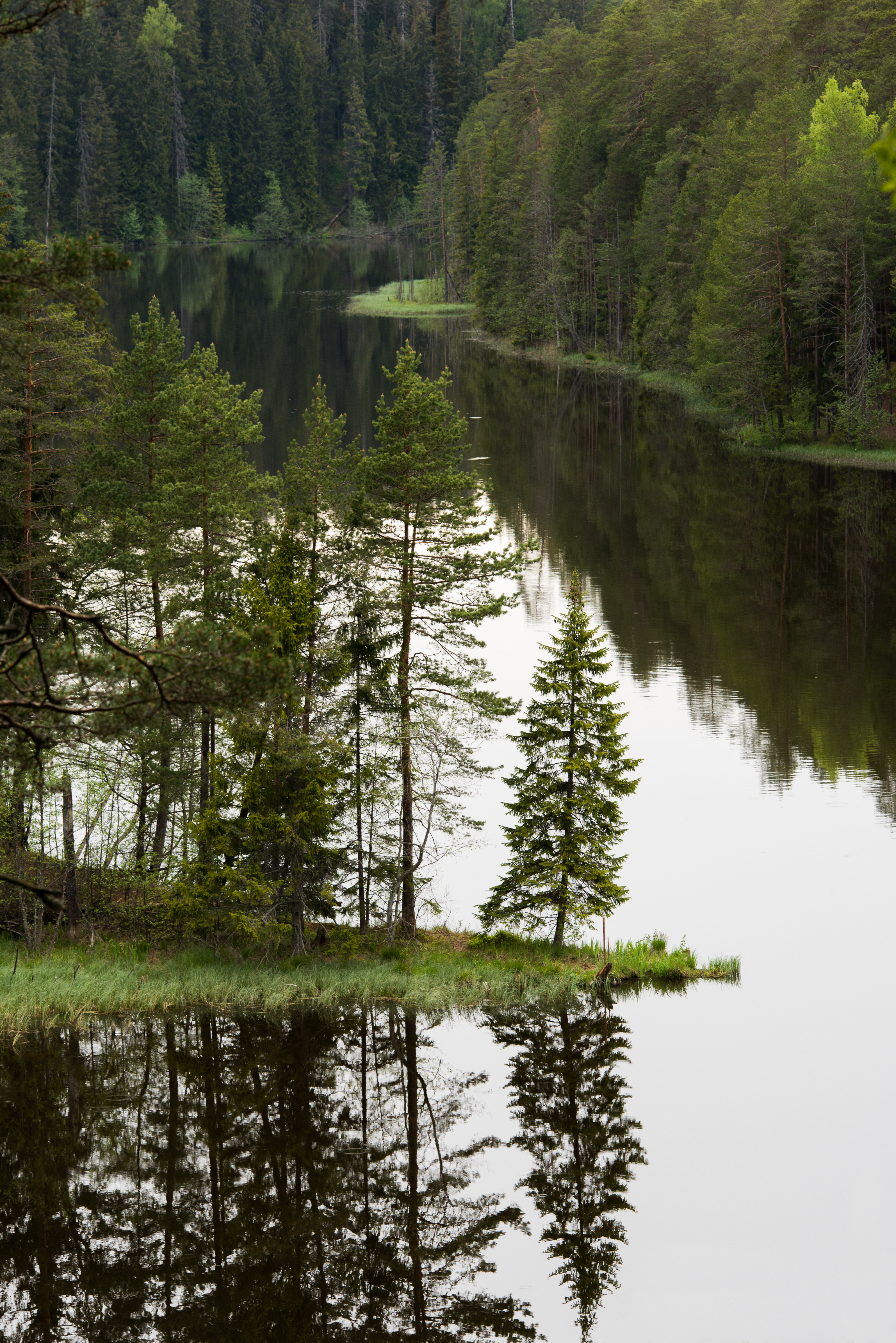 Ahja jõe ürgoru maastikukaitseala